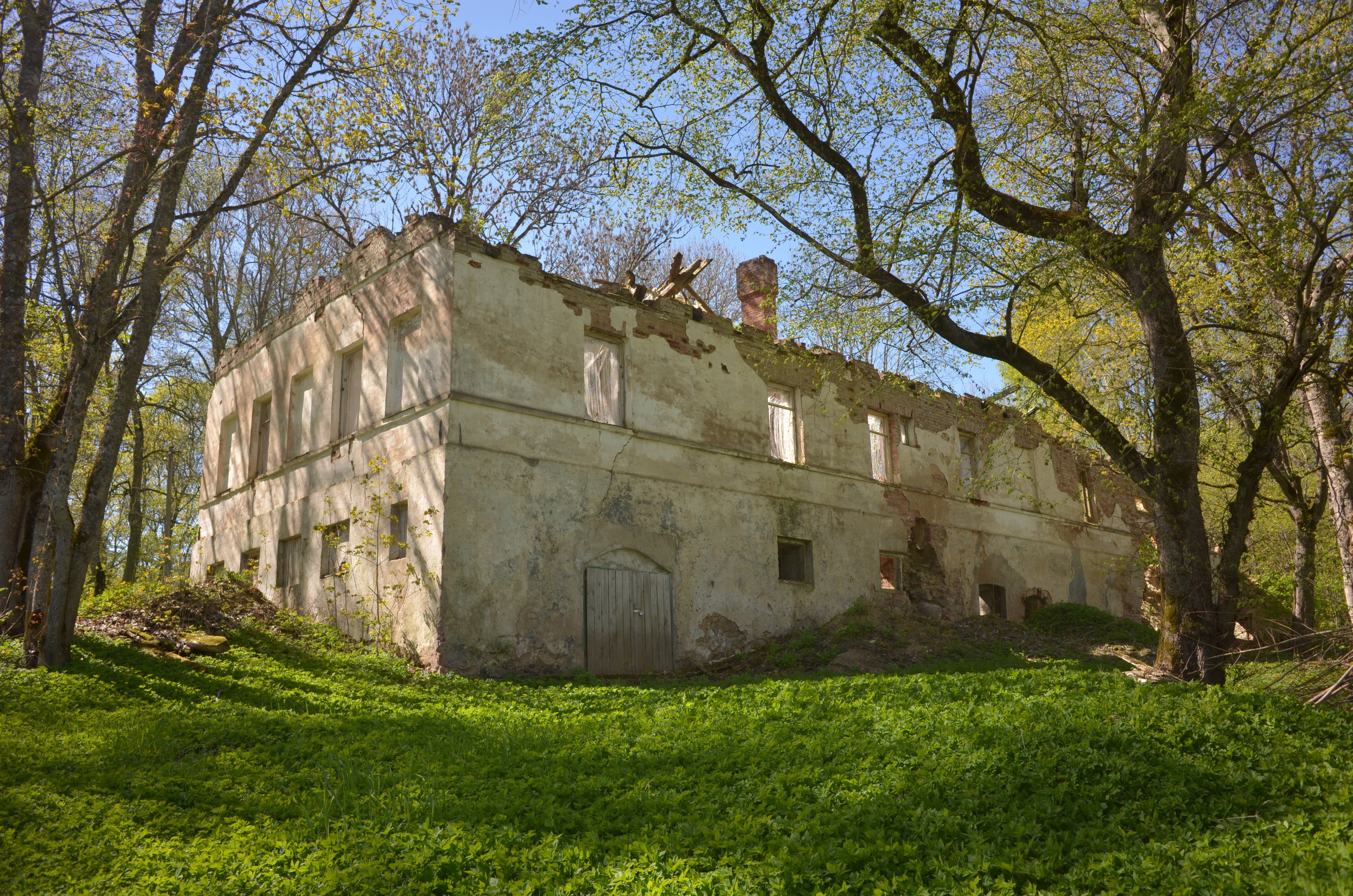 Kaiavere mõisa moonakamaja varemed 2018. aastal